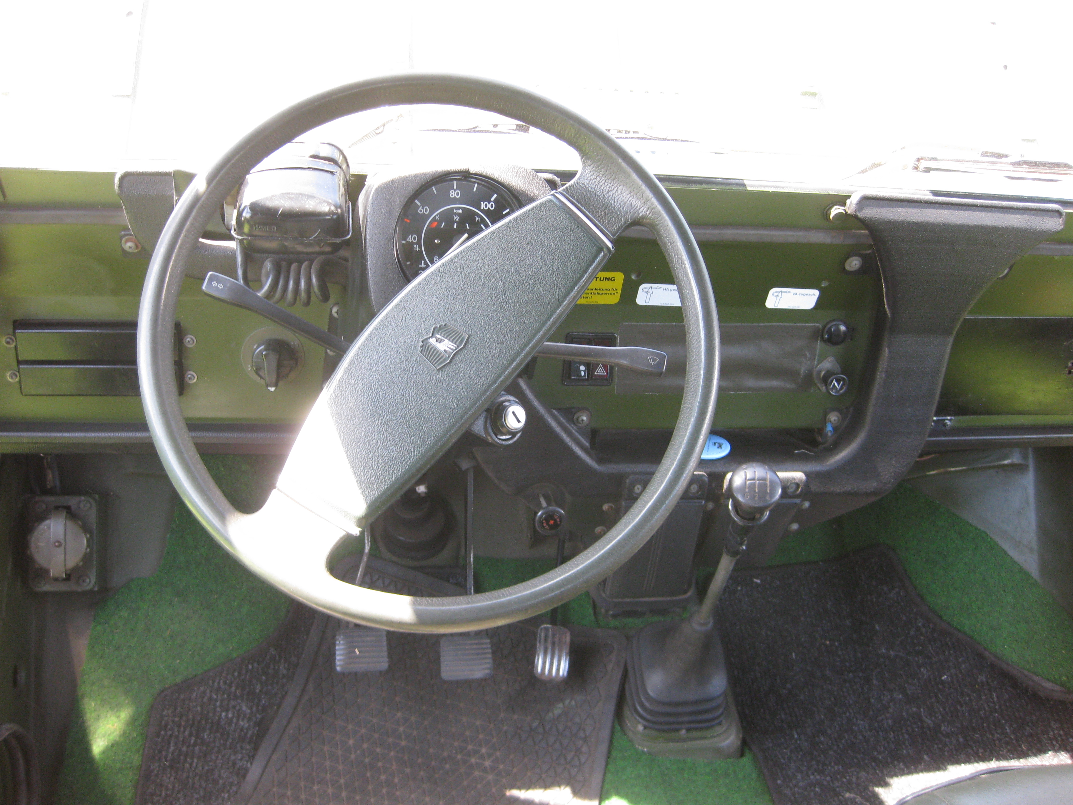 VW Iltis Cockpit